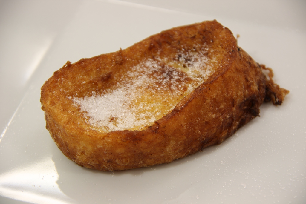 Detalle de una torrija con azúcar, alimento tradicional en la época de carnaval y cuaresma. Ver artículo en el blog ellaboratoriogastronomico